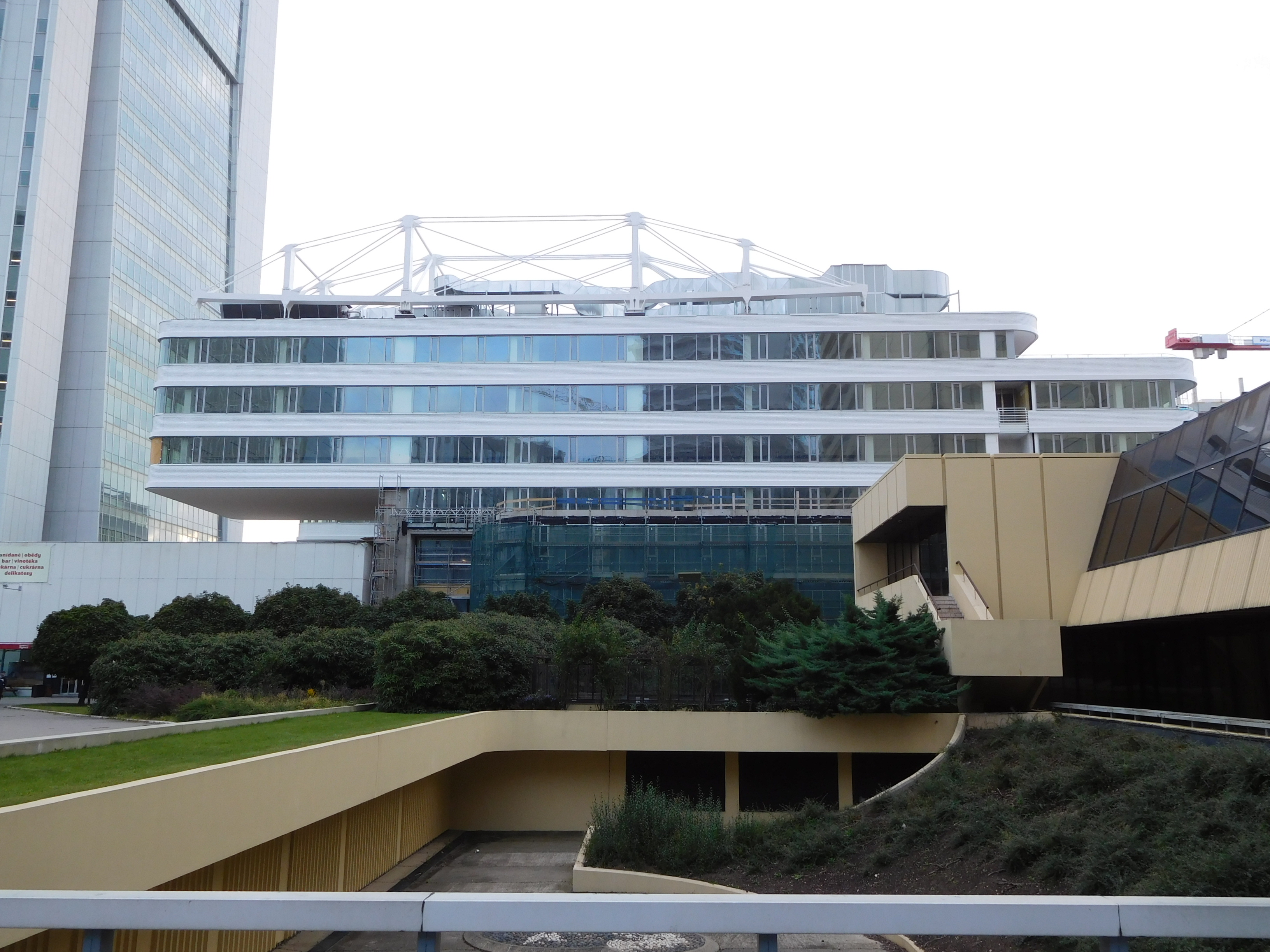 Trimaran - stavba; Praha - Pankrác